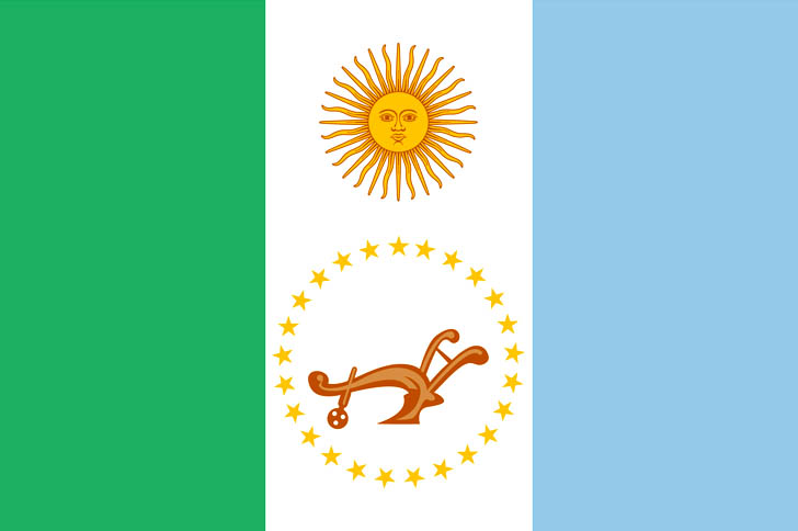 Bandera de la provincia del Chaco, Argentina